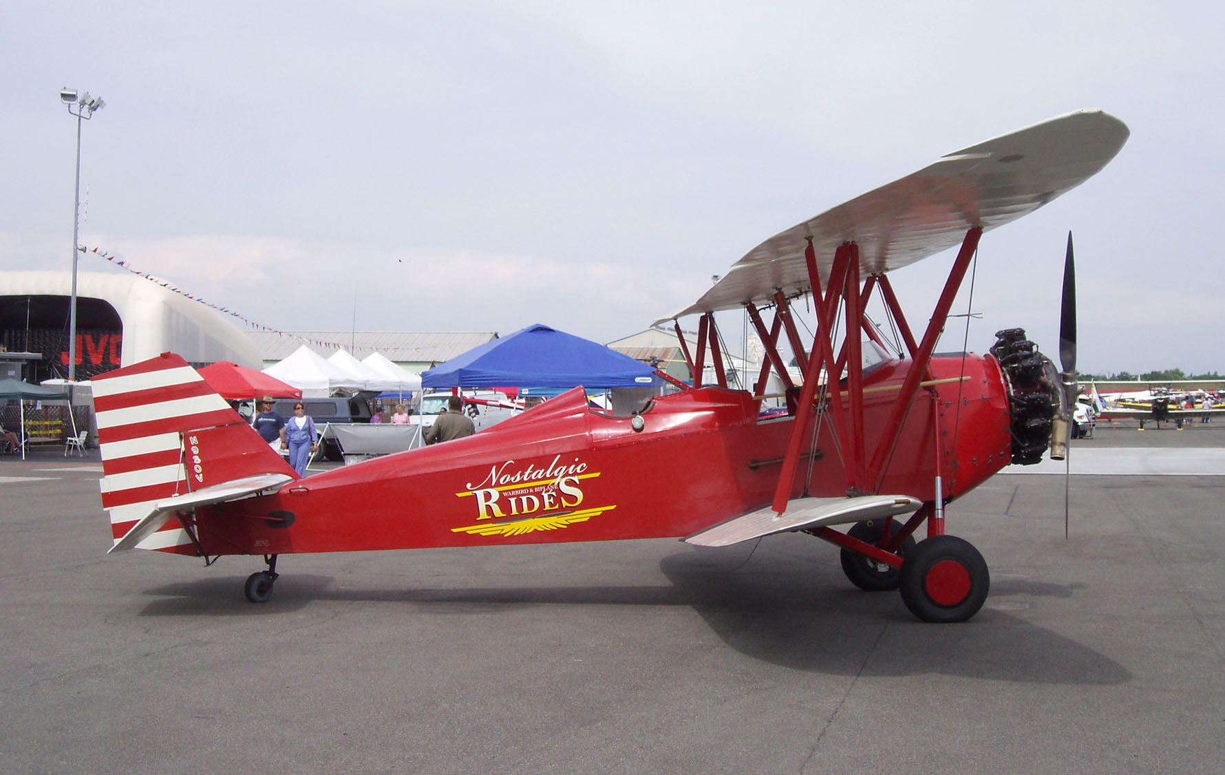 NewStandardD25n930V